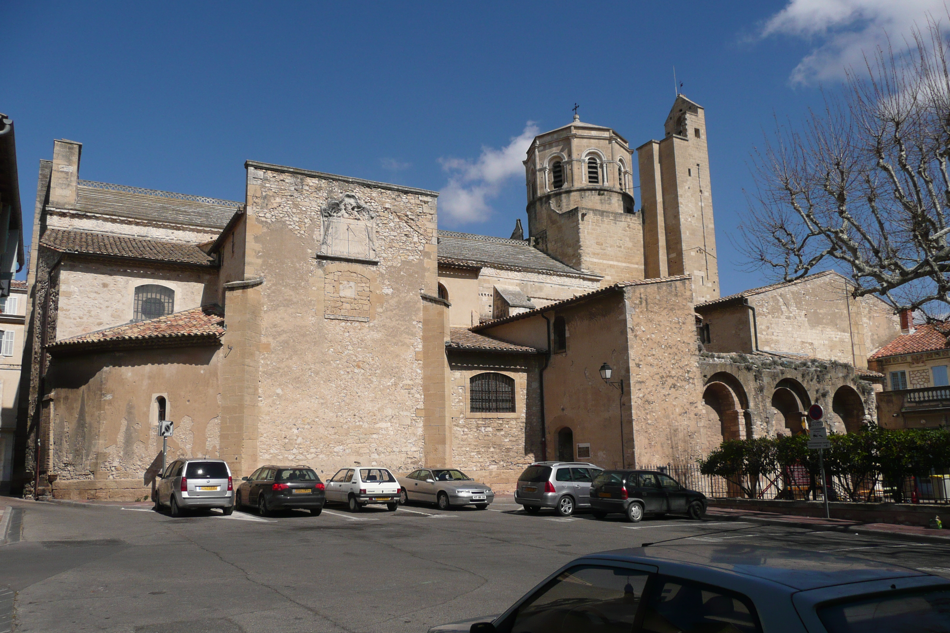 Cathèdrale Saint Véran à Cavaillon.